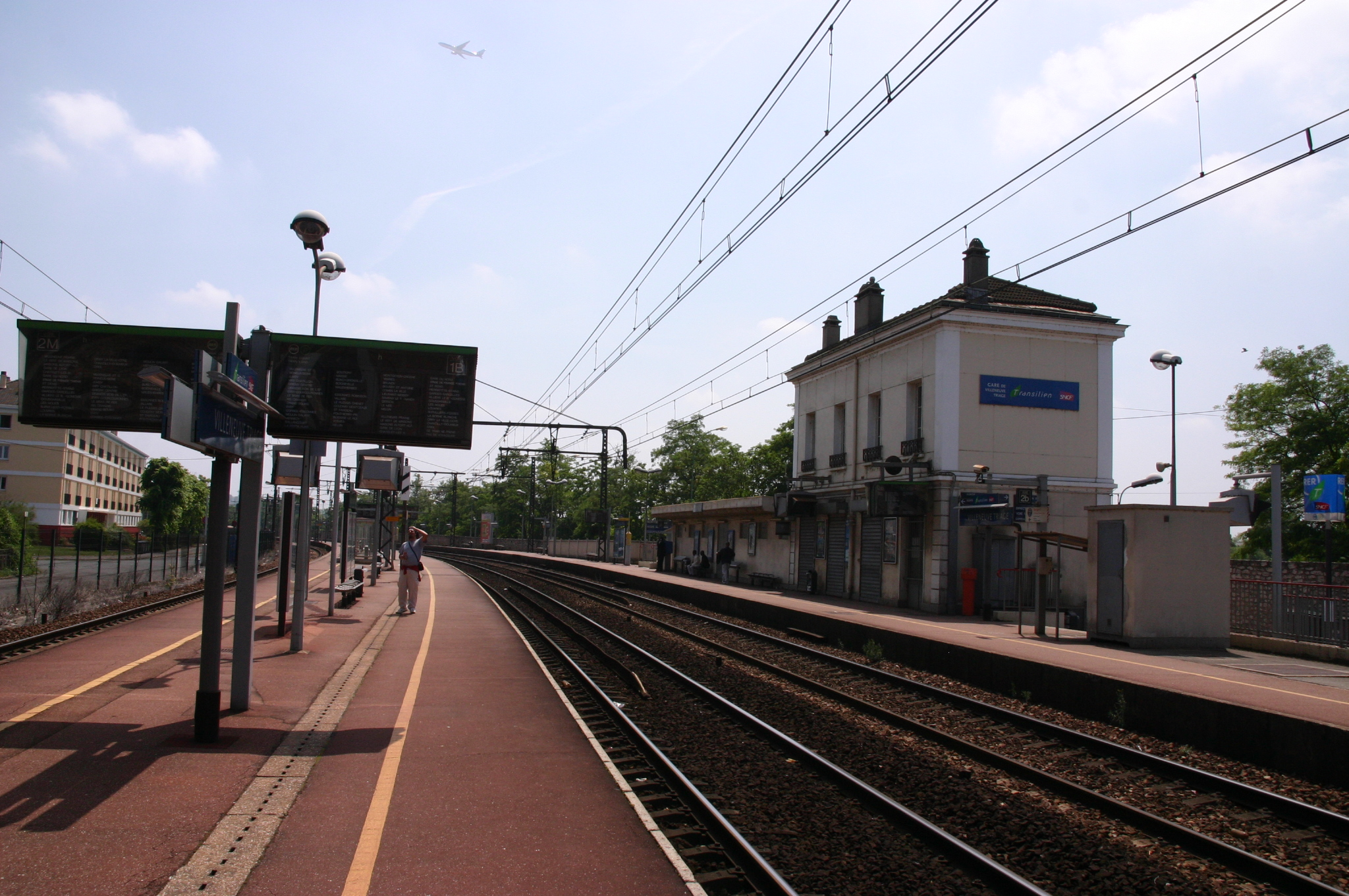 La gare de Villeneuve-Triage, Villeneuve-Saint-Georges, département du Val-de-Marne, France